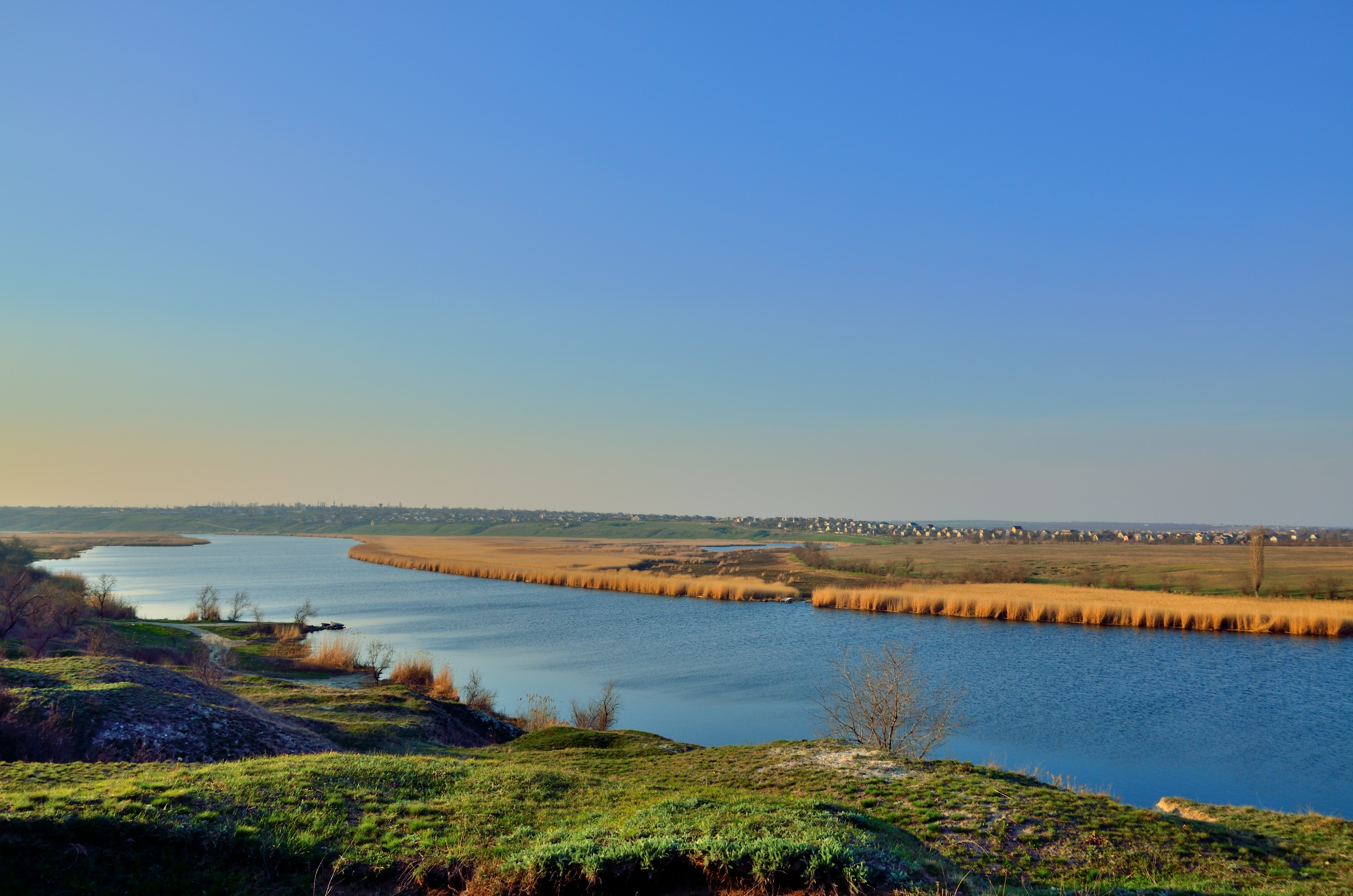 Інгул з видом на село Каравелове